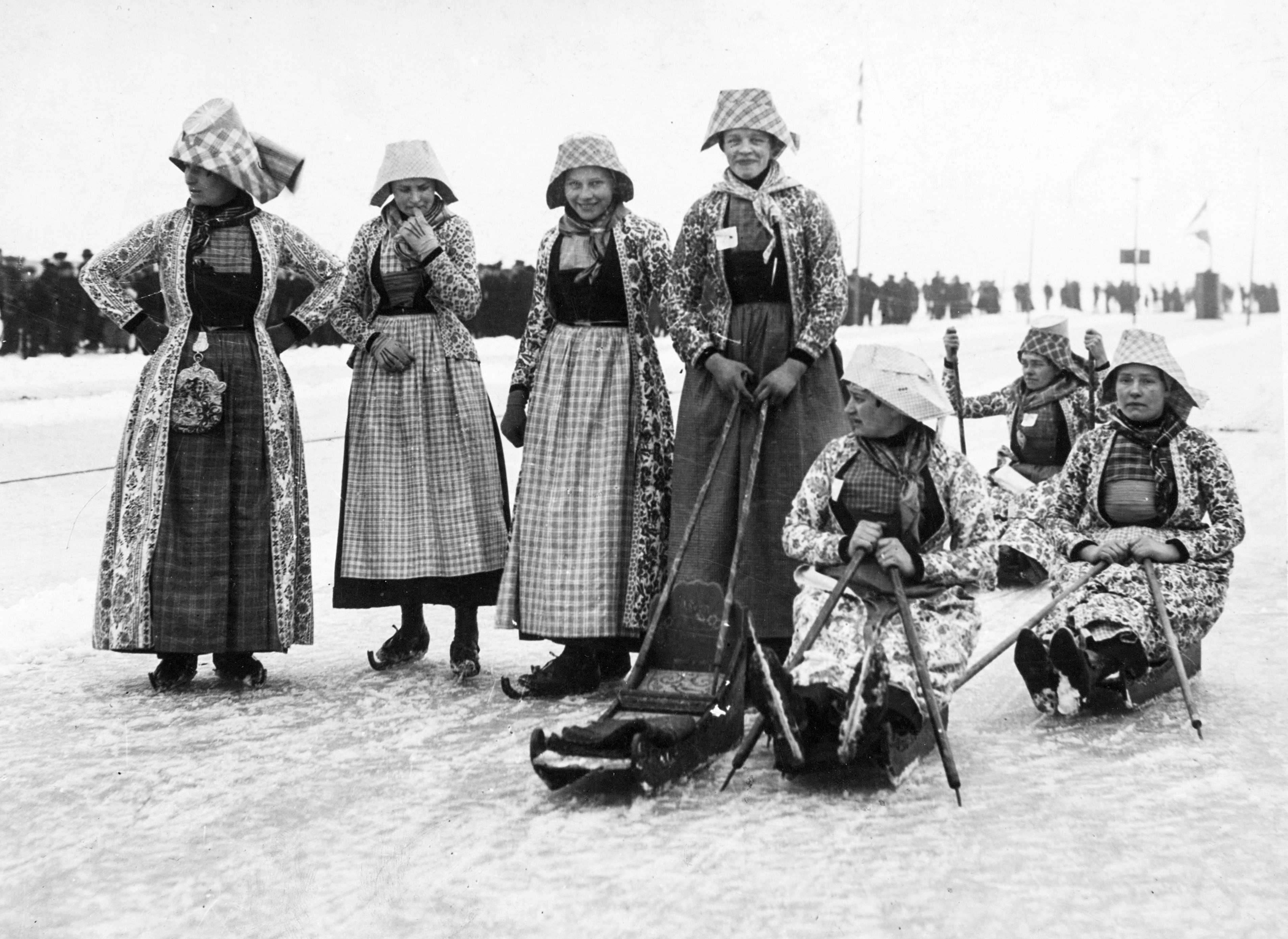 Hindeloopen